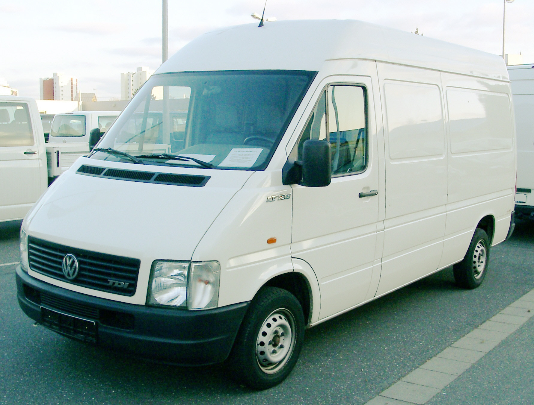 VW LT 28